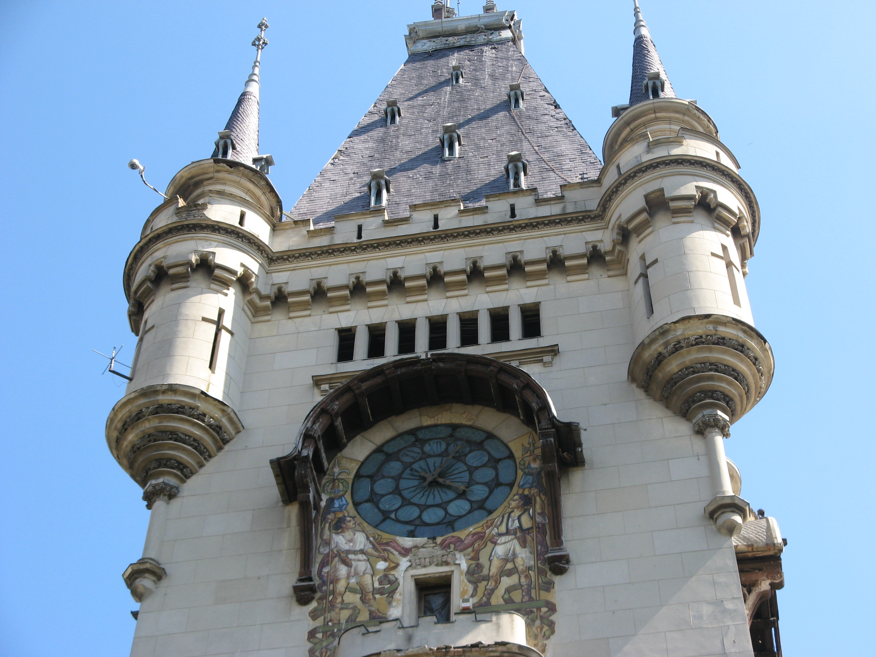 Palatul Culturii 01